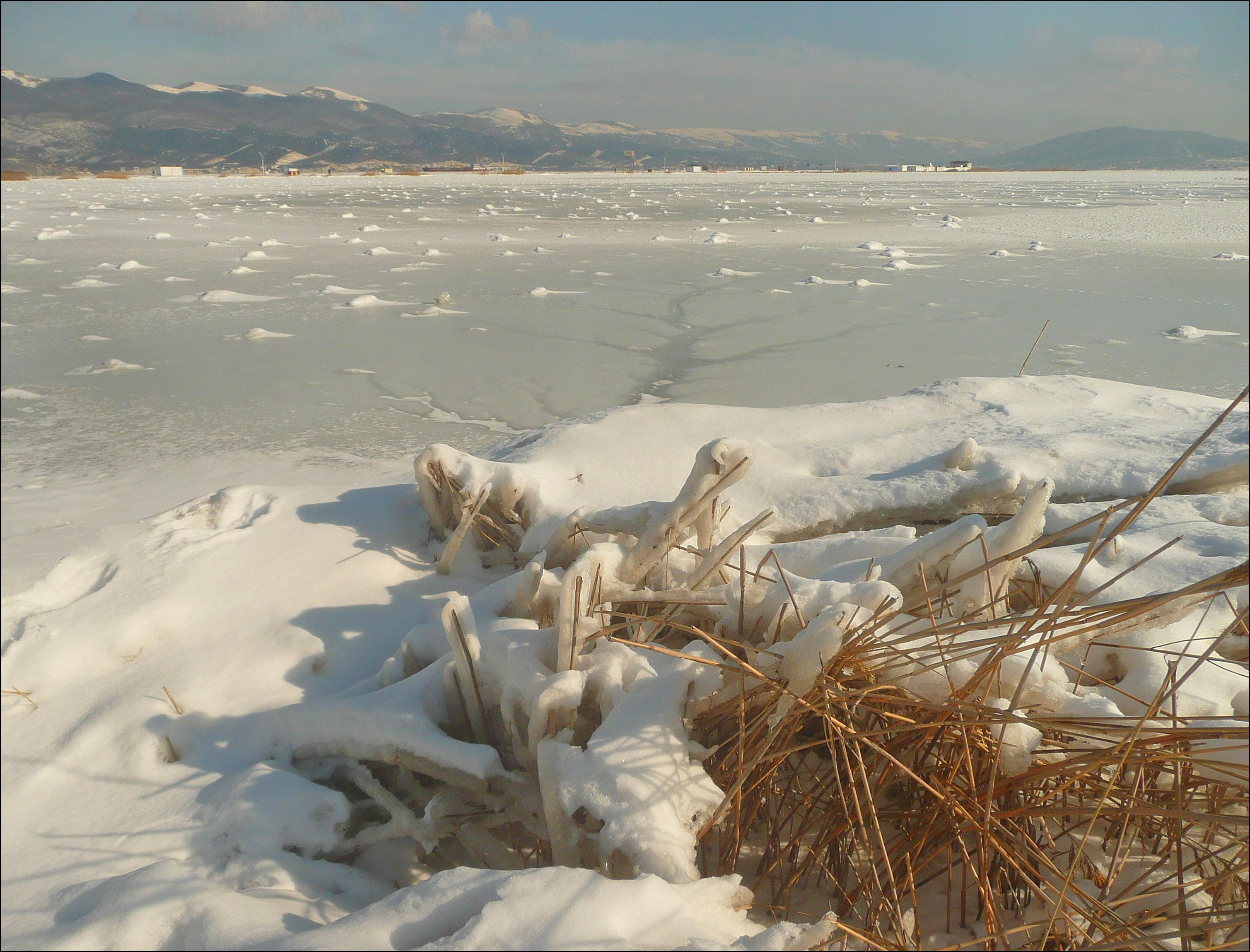 Суджукская лагуна, отделённая от моря Суджукской косой в холодные зимы замерзает, поскольку водоём неглубокий, всего до 1 м, и, как уже сказано, замкнутый, отделённый от незамерзающего моря косой. За ней на тот момент температура морской воды составляла +7°С. 3 февраля 2012 г.